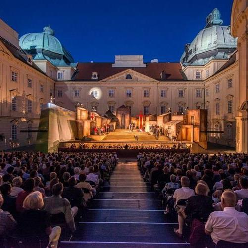 Kaiserhof